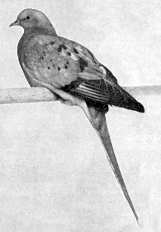 Young passenger pigeon.